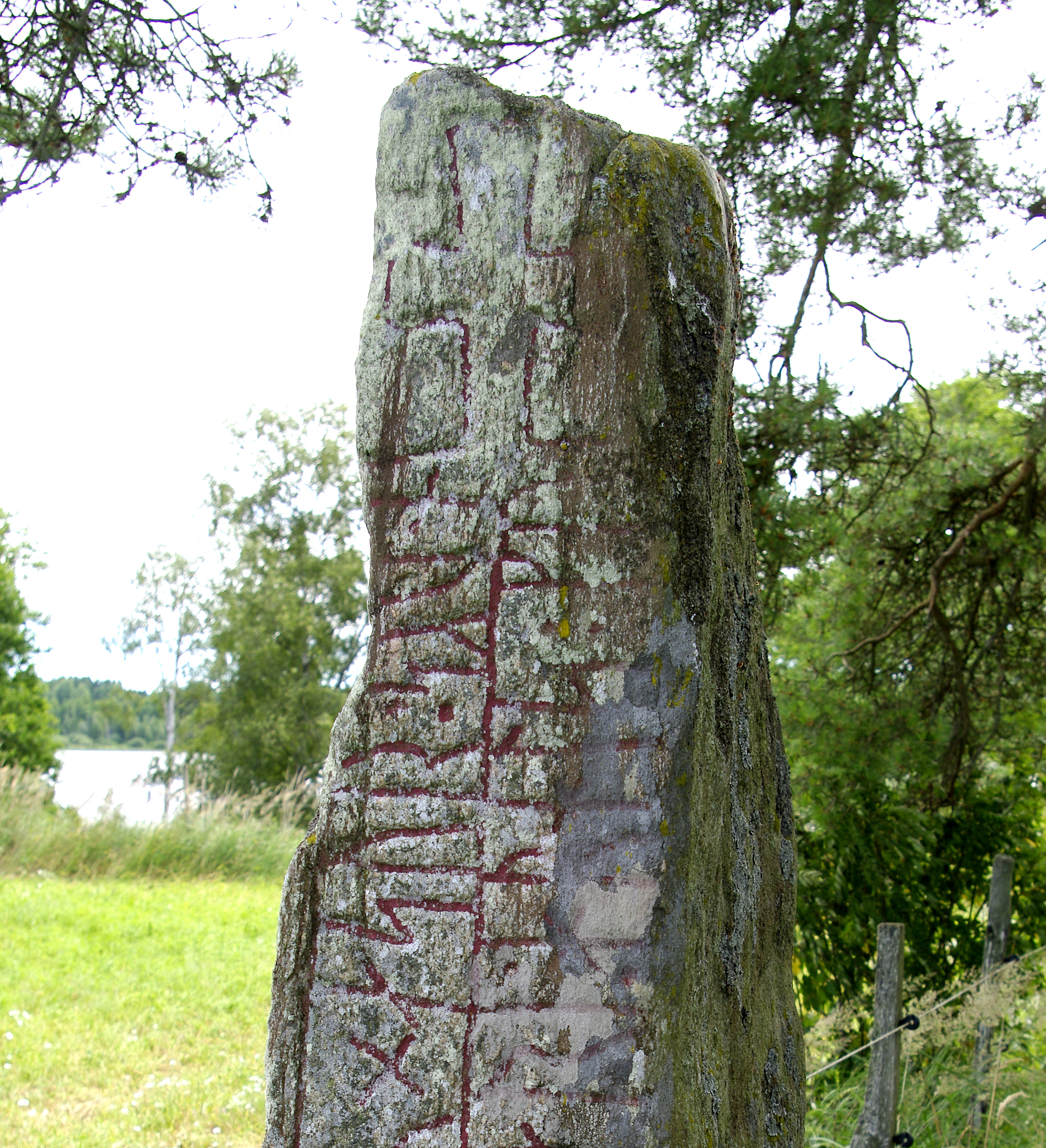 Rune stone at Ryssby, Småland, Sweden.